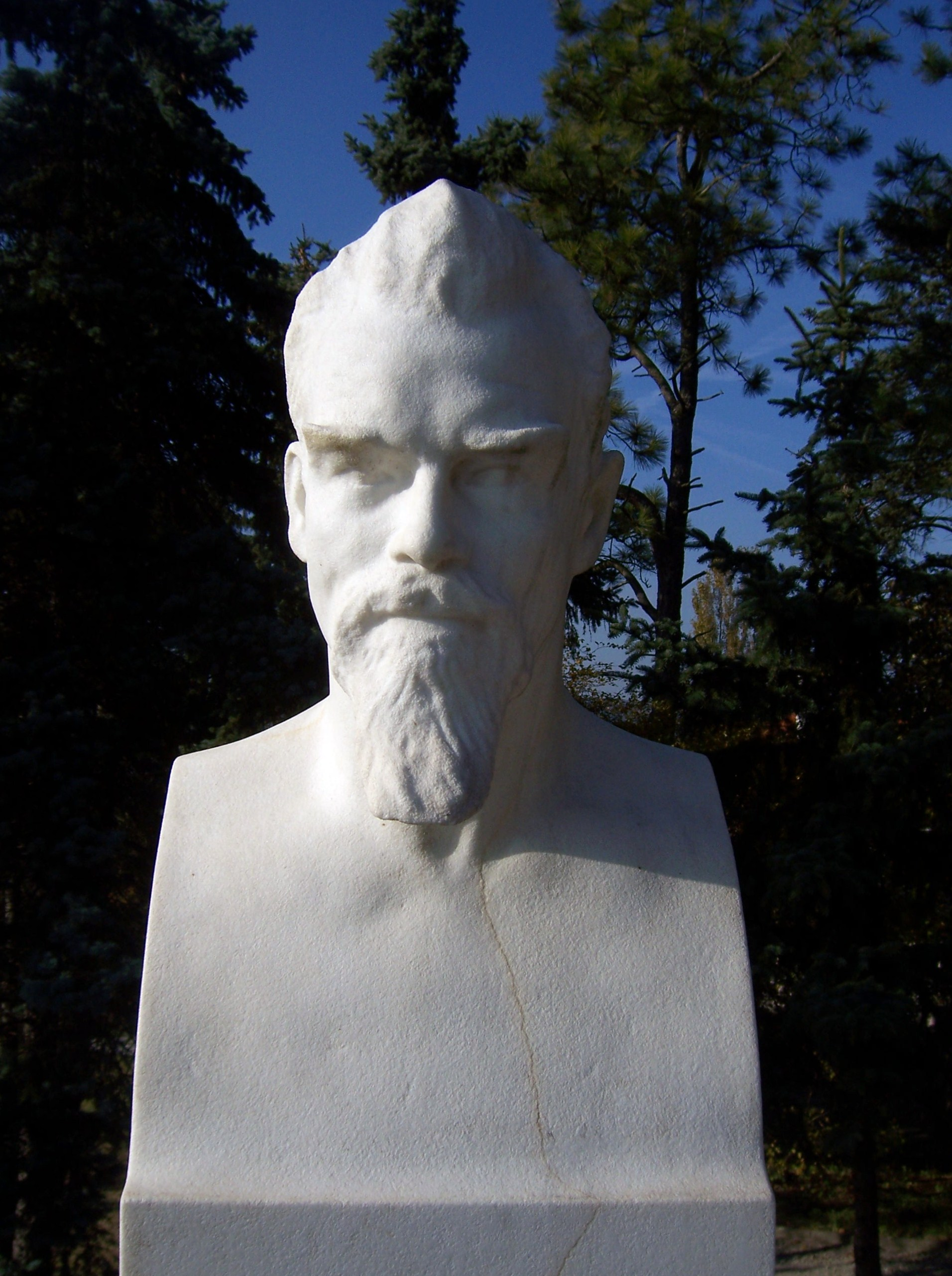 Grabstätte von Max Klinger, Marmor Marmorherme an der Grabmalanlage für Max Klinger in Großjena von Johannes Hartmann, 1921